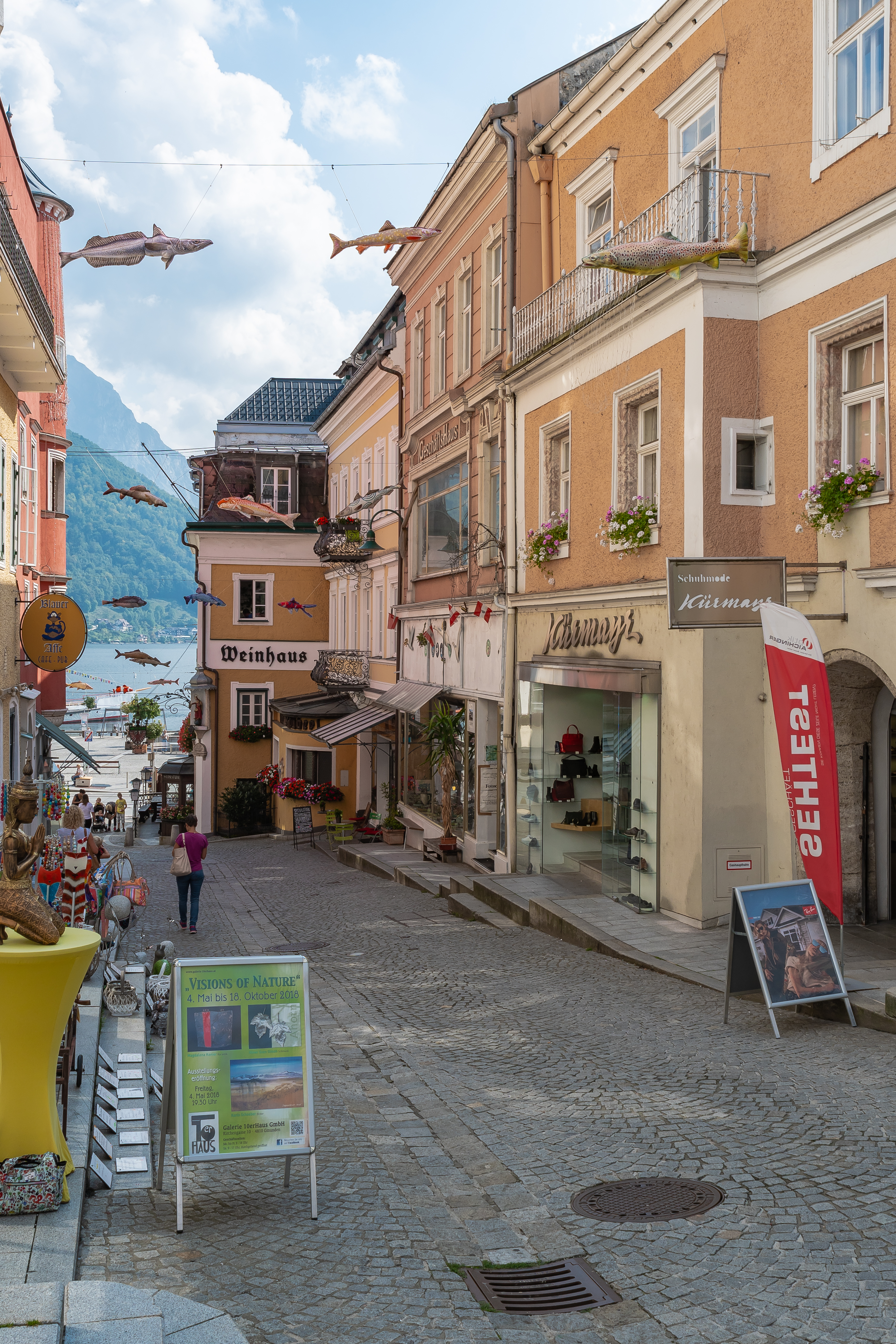 Blick in die Kirchengasse von der Kreuzung mit der Pfarrhofgasse